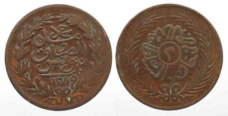 Pièce de 2 nasrys (aspres) Tunisiens frappée à Tunis en l'an 1289 AH (1872 AD) durant le reigne de Sadok Bey